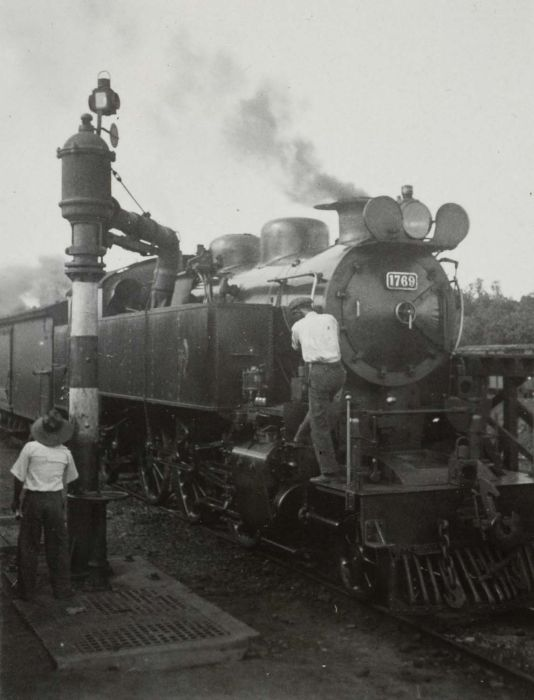 Foto. Een stoomlocomotief tankt water op station Praboemoelih